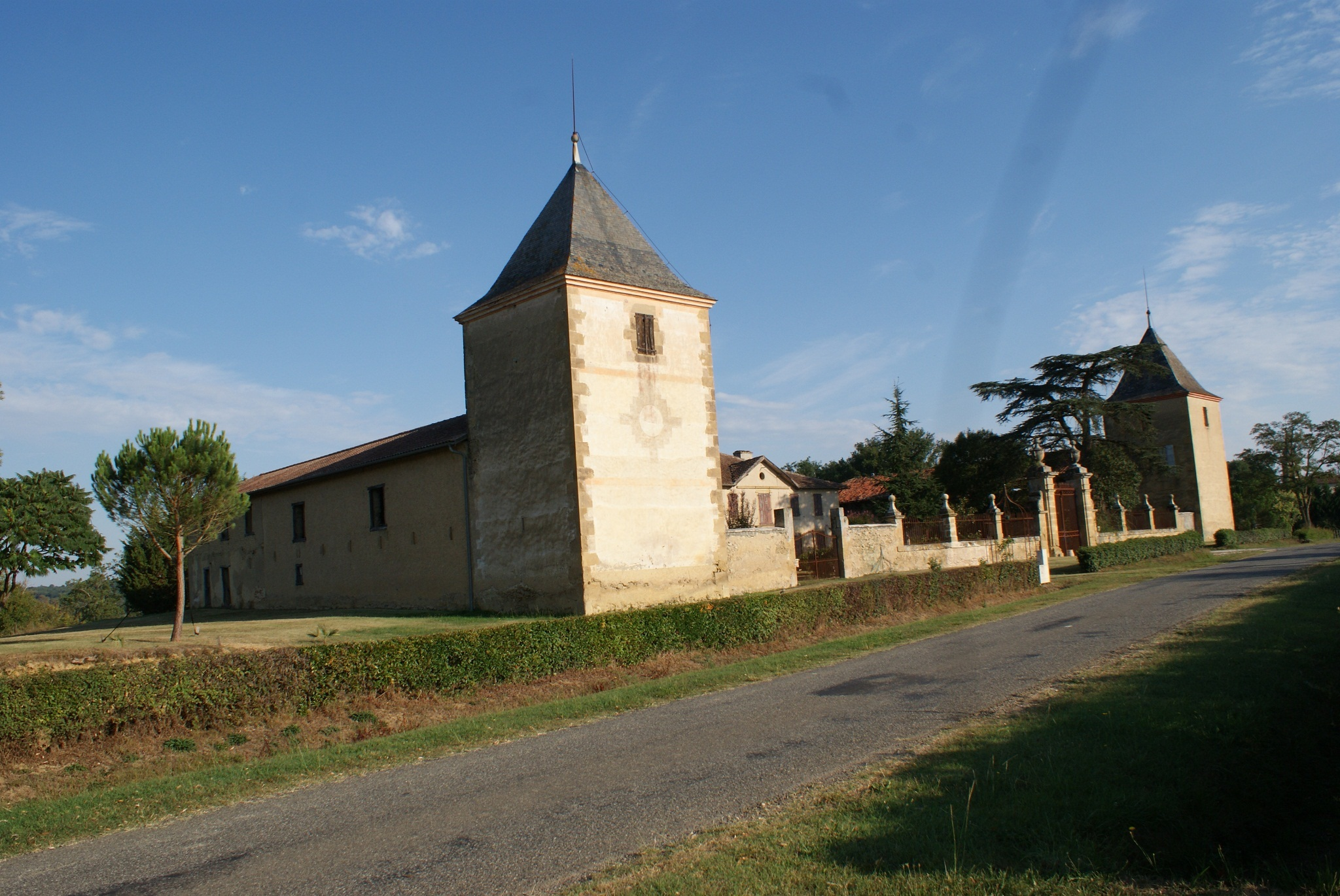 Kasteelboerderij bij Lunax (Haute-Garonne, Frankrijk).